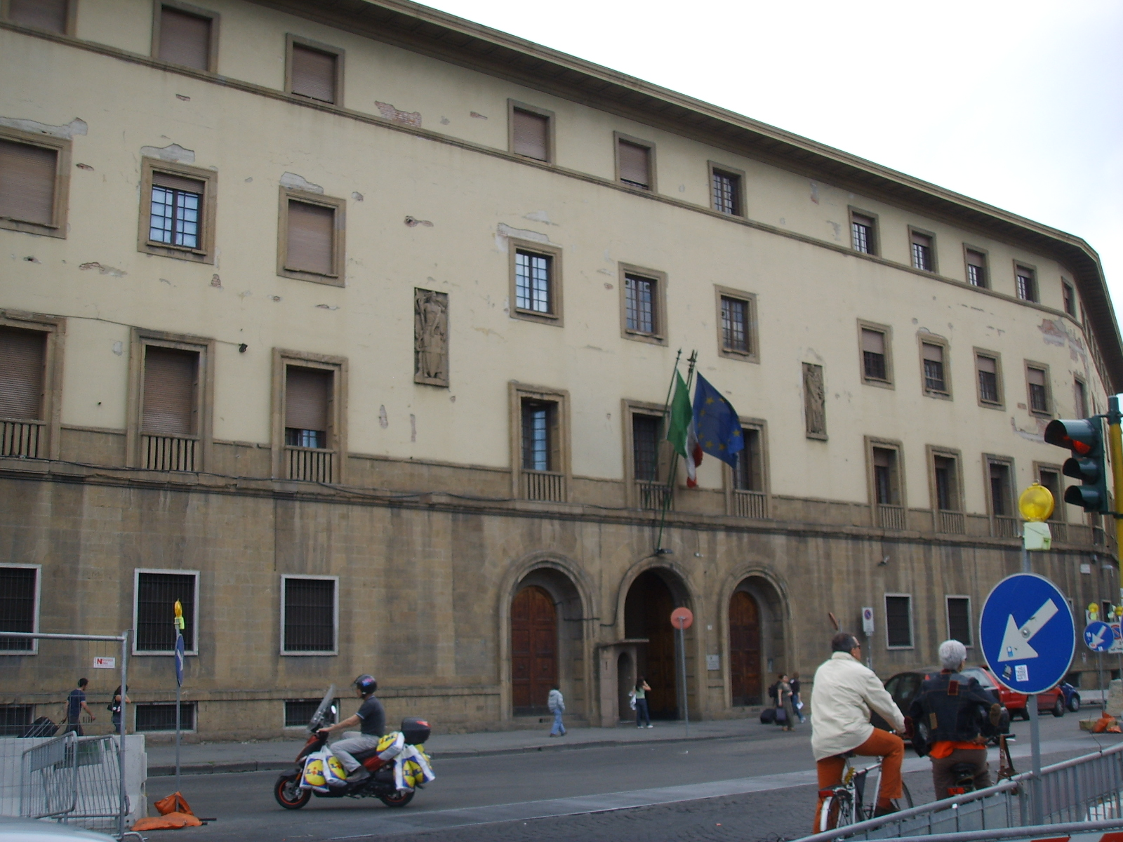 Caserma_della_Scuola_allievi_Marescialli_dei_Carabinieri,_Firenze in Florence